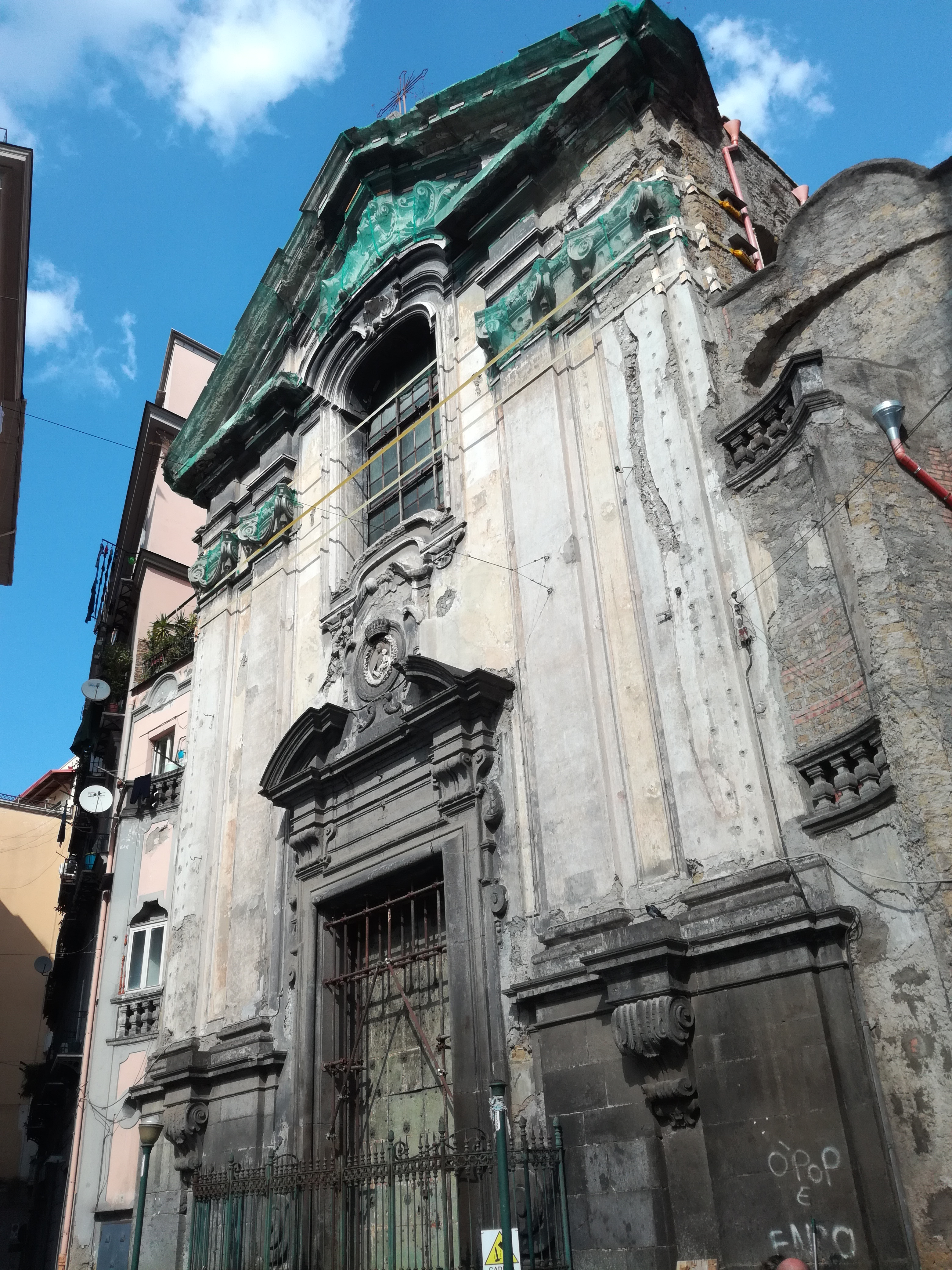 Facciata della Chiesa di Santa Maria in Cosmedin (Napoli)